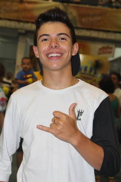 O ator e cantor Thomaz Costa em 2016.